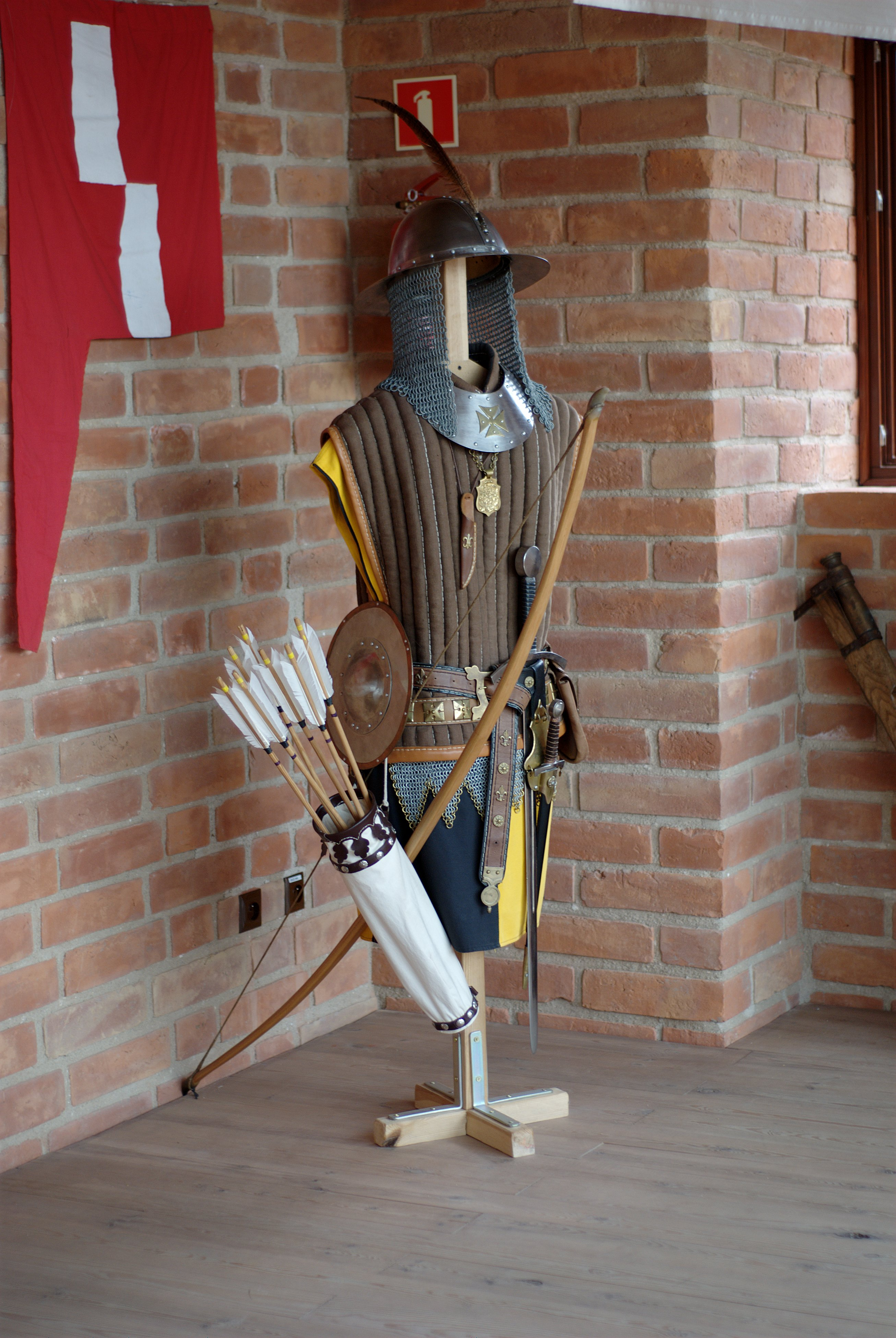 Wystawa broni i uzbrojenia średniowiecznego w baszcie nr 24. Zbroja łucznika.